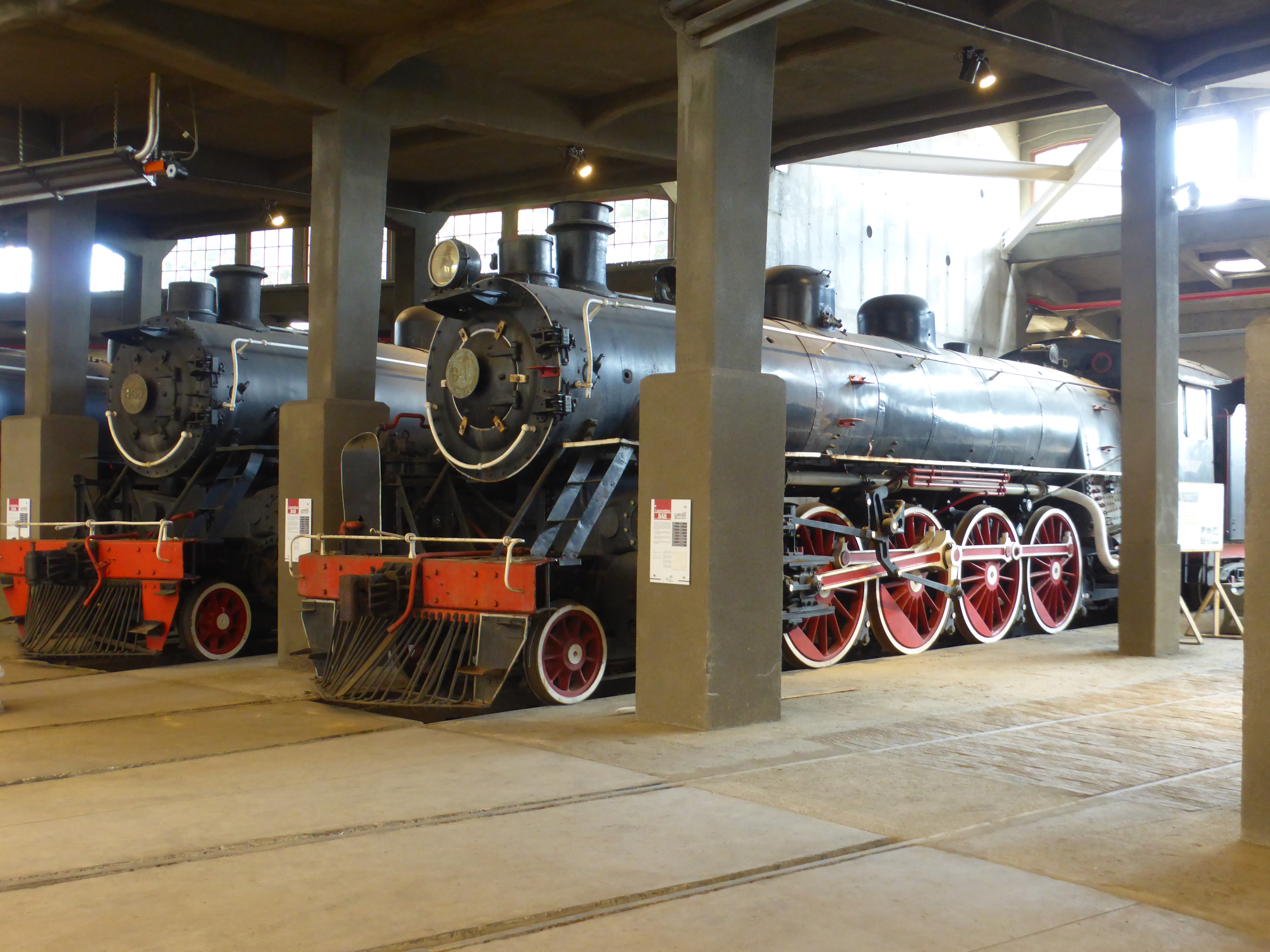 La locomotora más próxima es la número 848 de Ferrocarriles del Estado, construida en 1952-1953 por "Mitsubishi Heavy Industries (Reformed)", MHIR, en Japón; según planos de la norteamericana The Baldwin Locomotive Works (BLW). Rodaje tipo 241 (4-8-2 contando el total de ruedas). Perteneció siempre a la dotación de la Casa de Máquinas de Temuco.